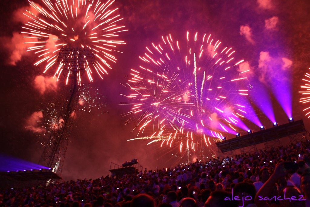 Ceremonia de apertura de los Juegos Sudamericanos de 2010